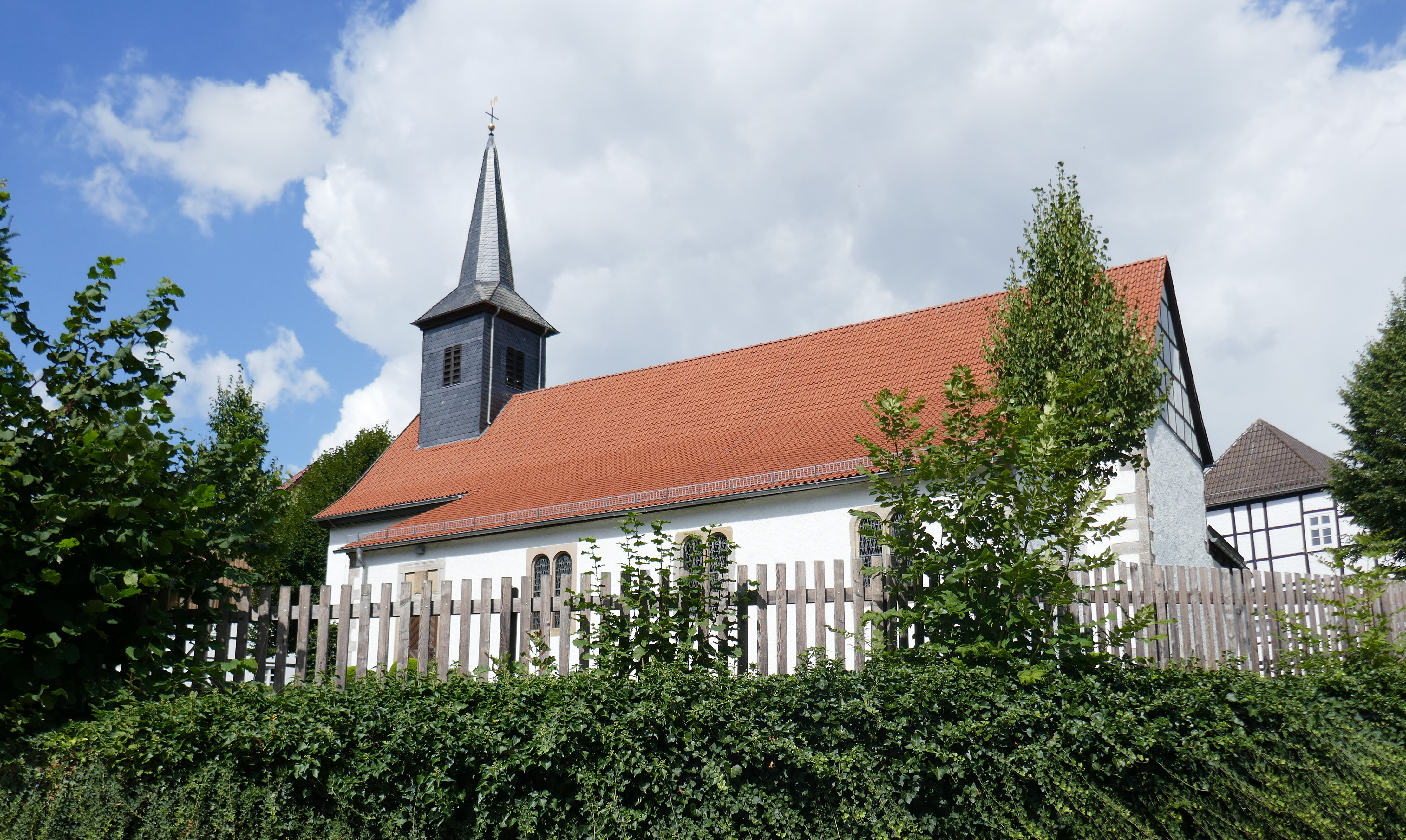 St. Johannes Baptist Kirche in Holzhausen